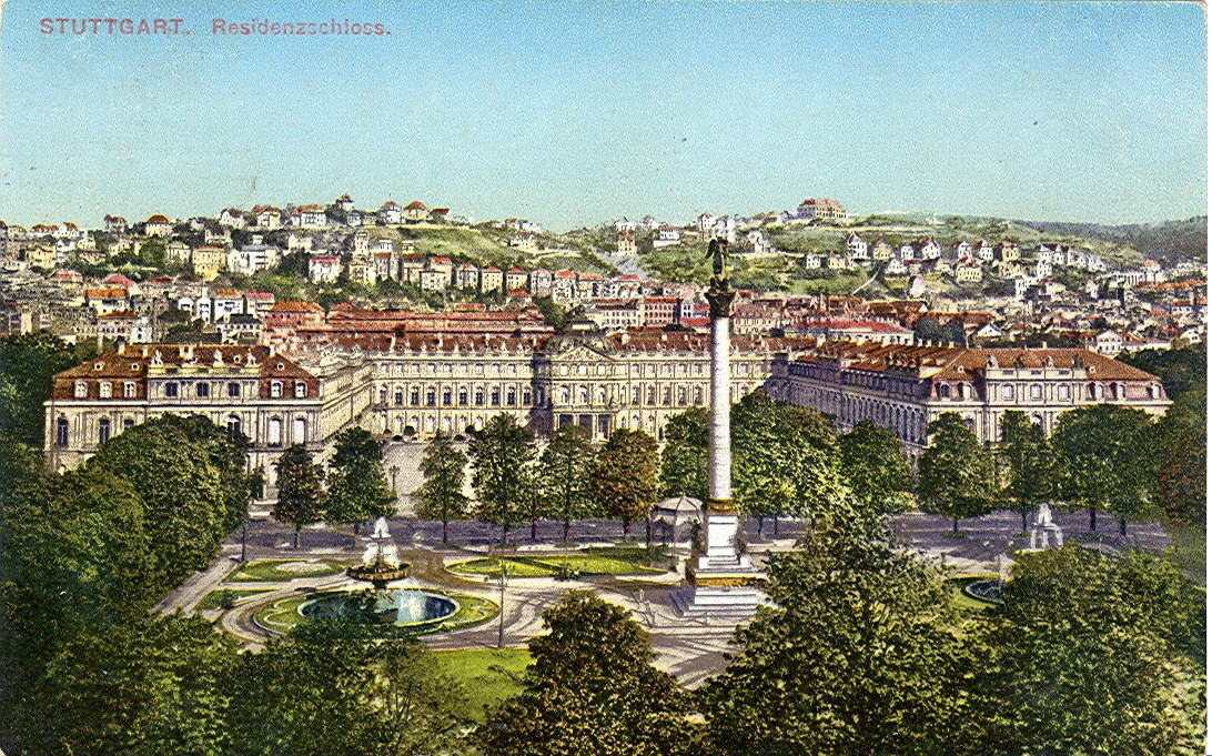 "Stuttgart - Residenzschloss", Postkarte.